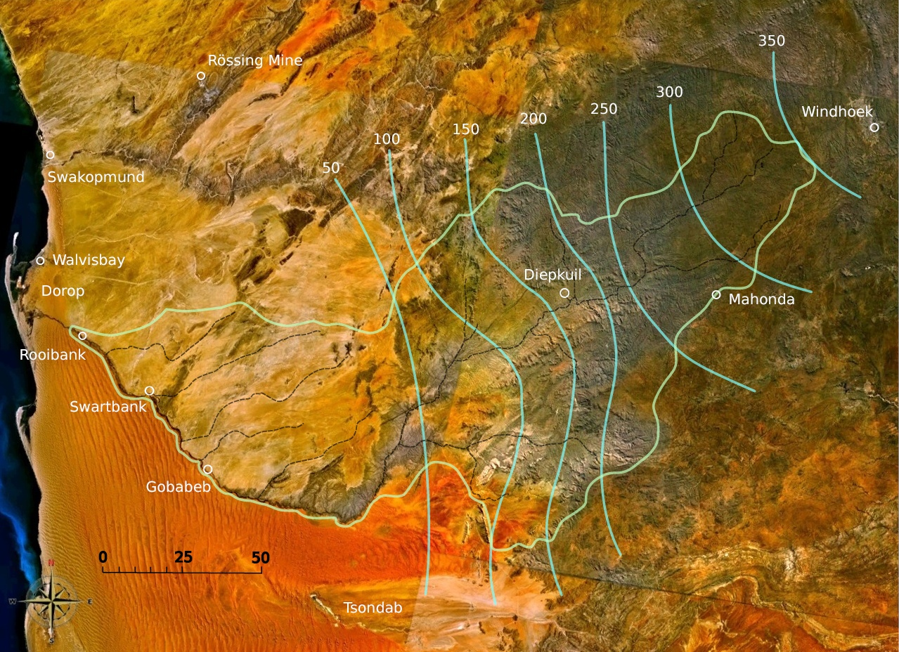 Kuiseb, Namibia: Einzugsgebiet und durchschnittlicher jährlicher Niederschlag in mm. Entfernung in km.